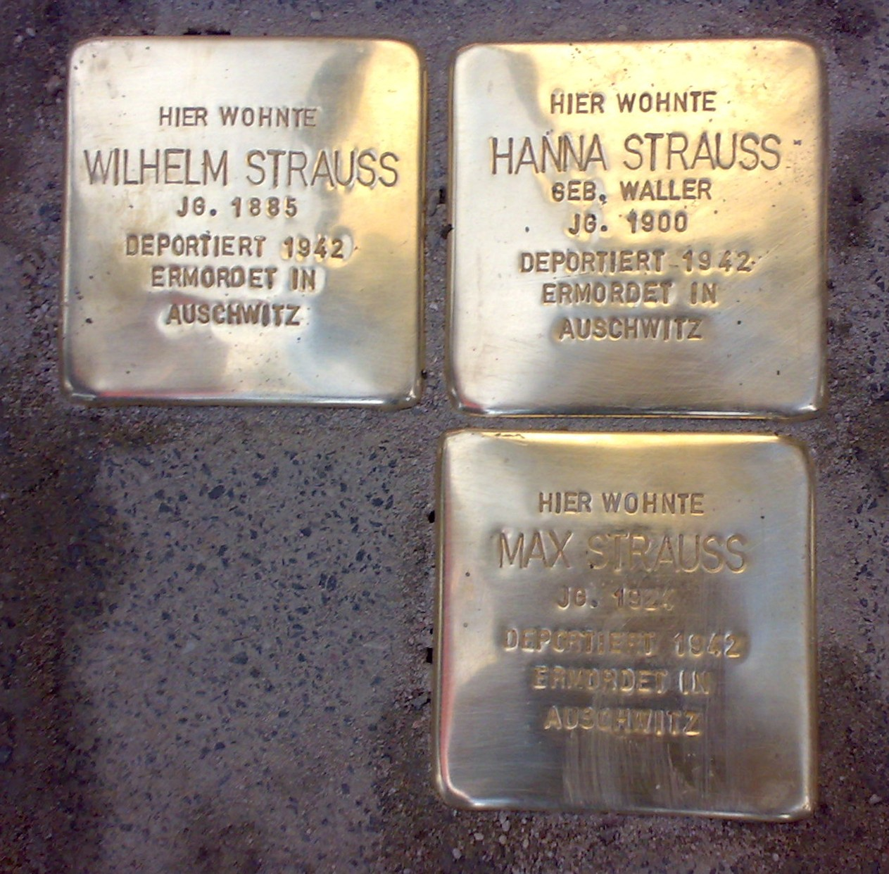 Stolpersteine, verlegt am 12.10.2009 durch Günther Demming in Schmitten (Taunus)